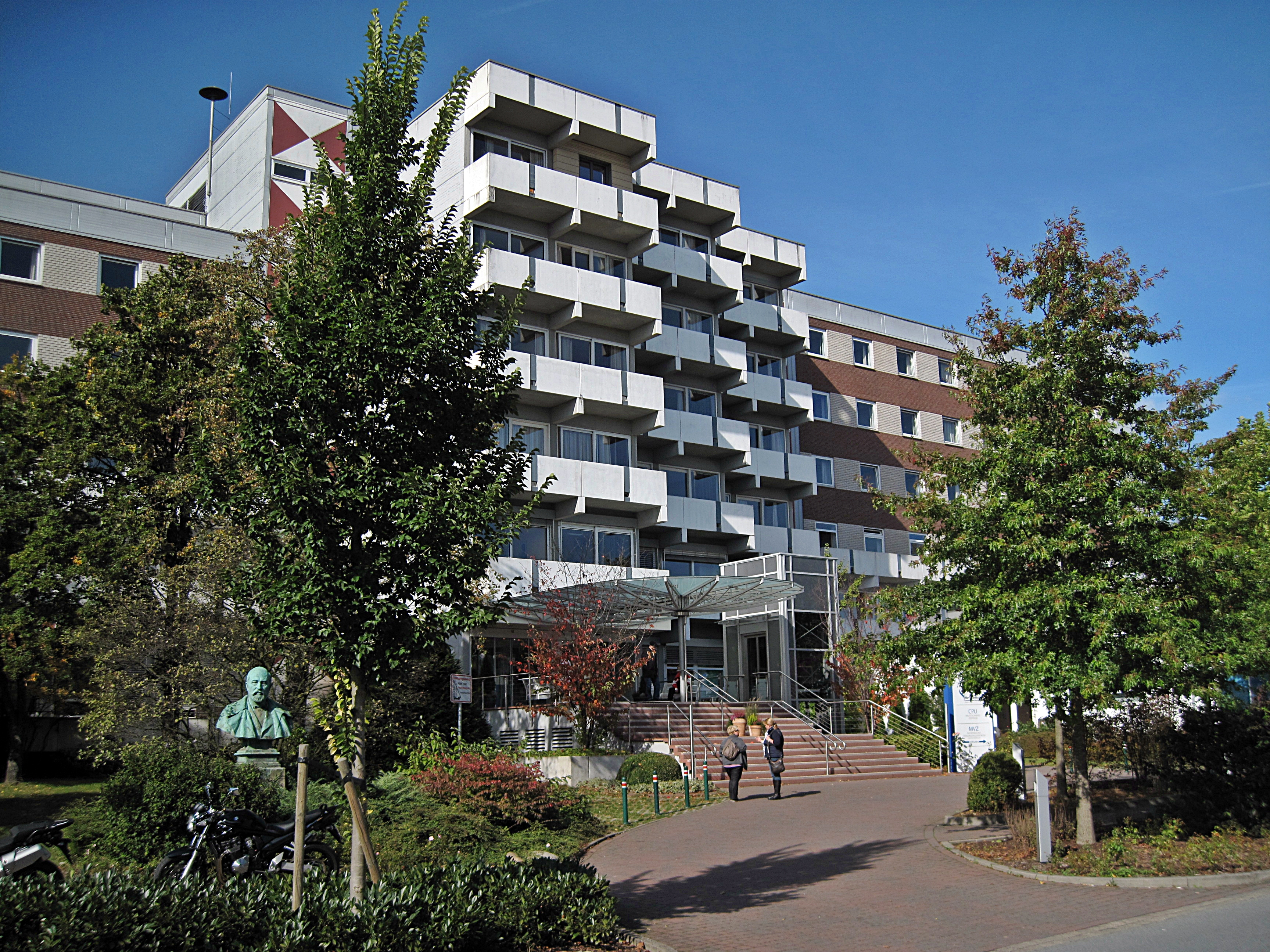 Bad Rothenfelde, Schüchtermannklinik, Haupteingang